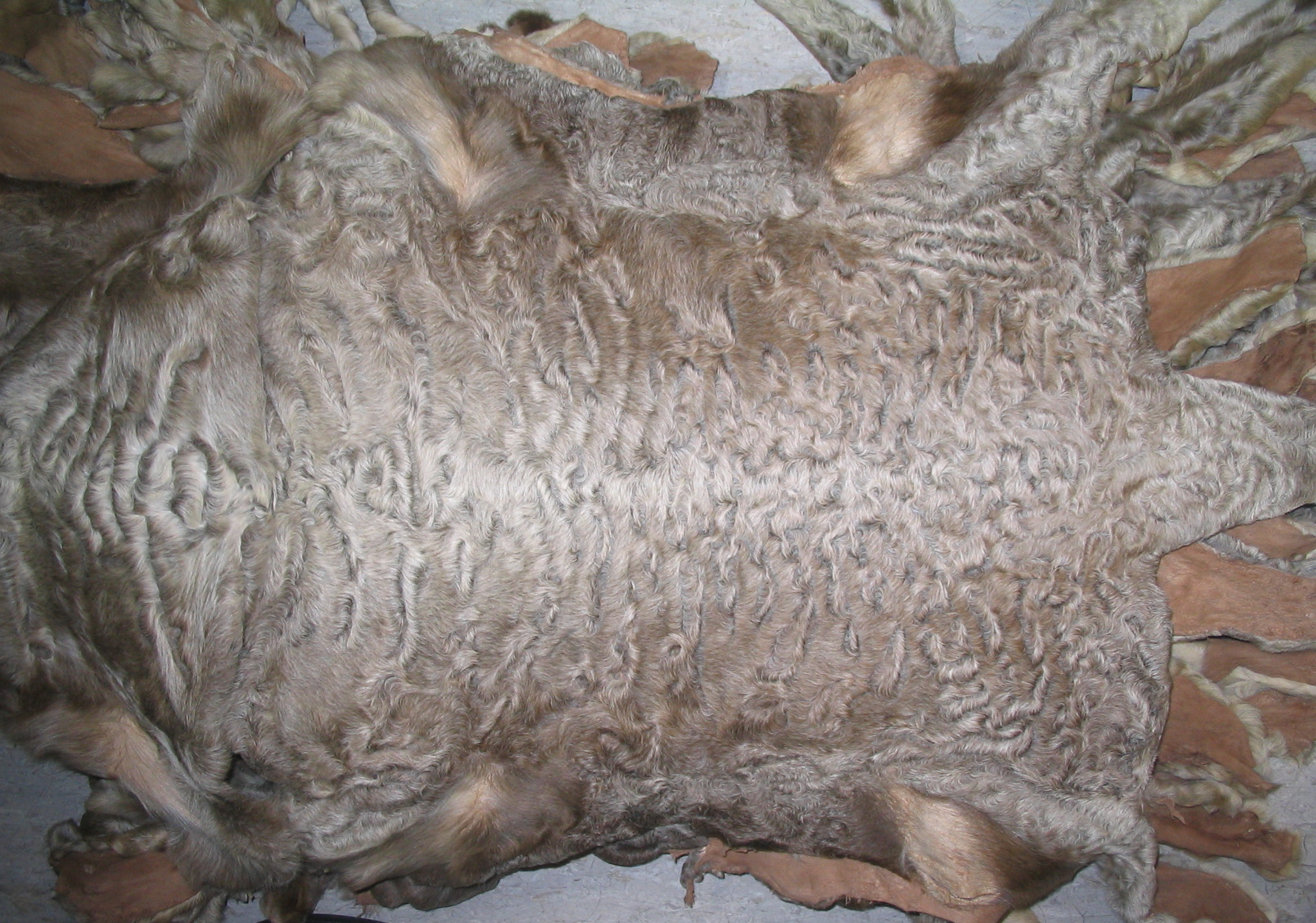 Fellbund (Kürschnersortiment) cashmeregefärbte, afghanische Persianerfelle. Gesehen im Pelzatelier Halfmann, Düsseldorf.